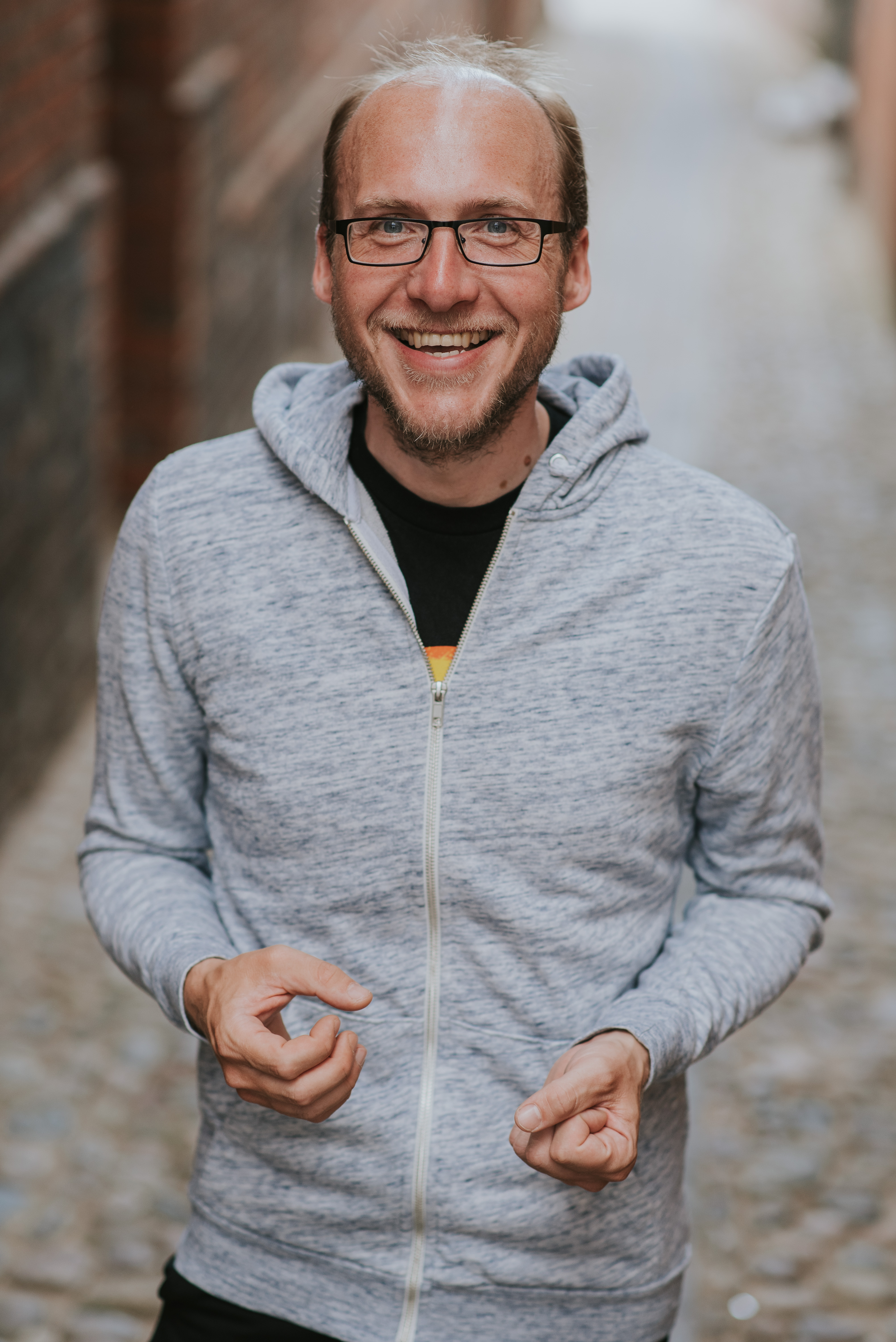 Florian Freistetter, Astronom, Autor und Mitglied der Science Busters